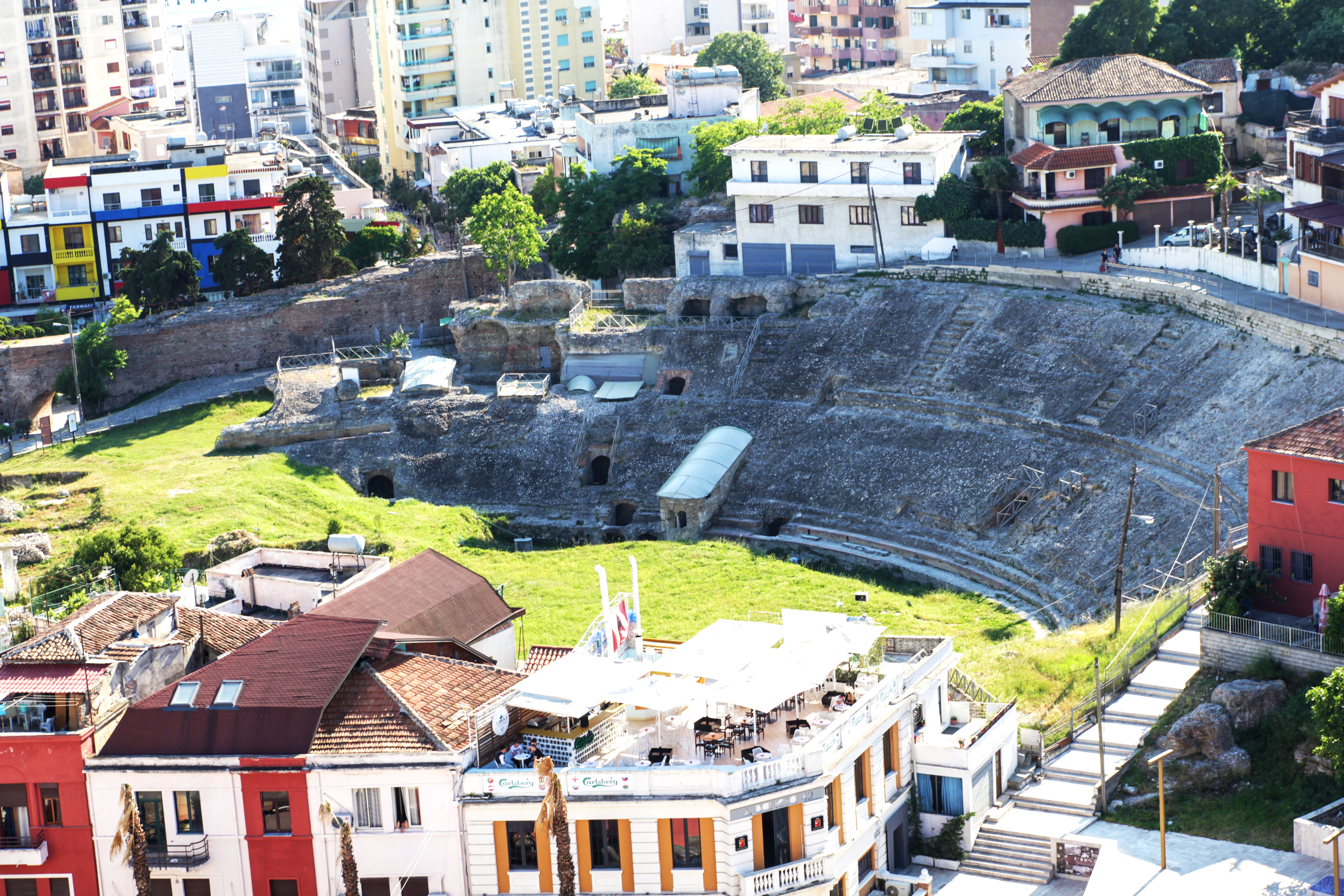 Amfiteatri i Durrësit